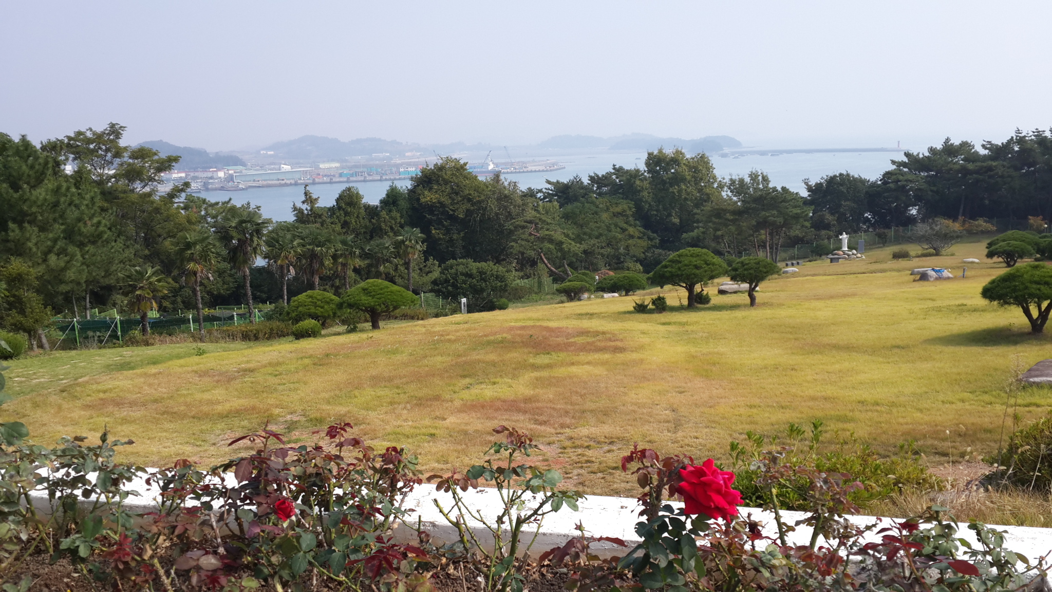 소록도의 전경